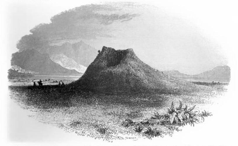 Soros di Maratona nel 1830 circa.